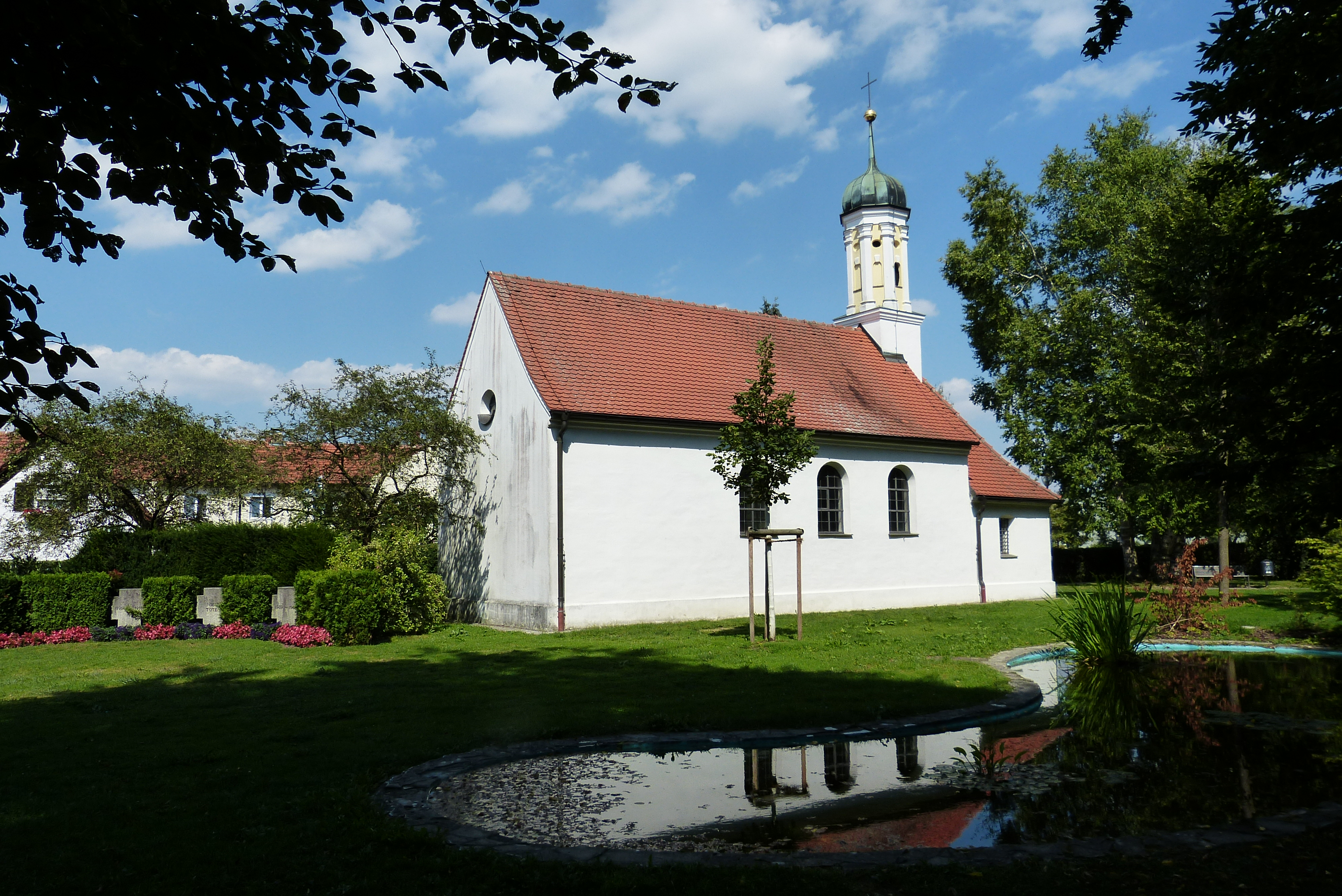 Ägidiuskapelle in Neusäß